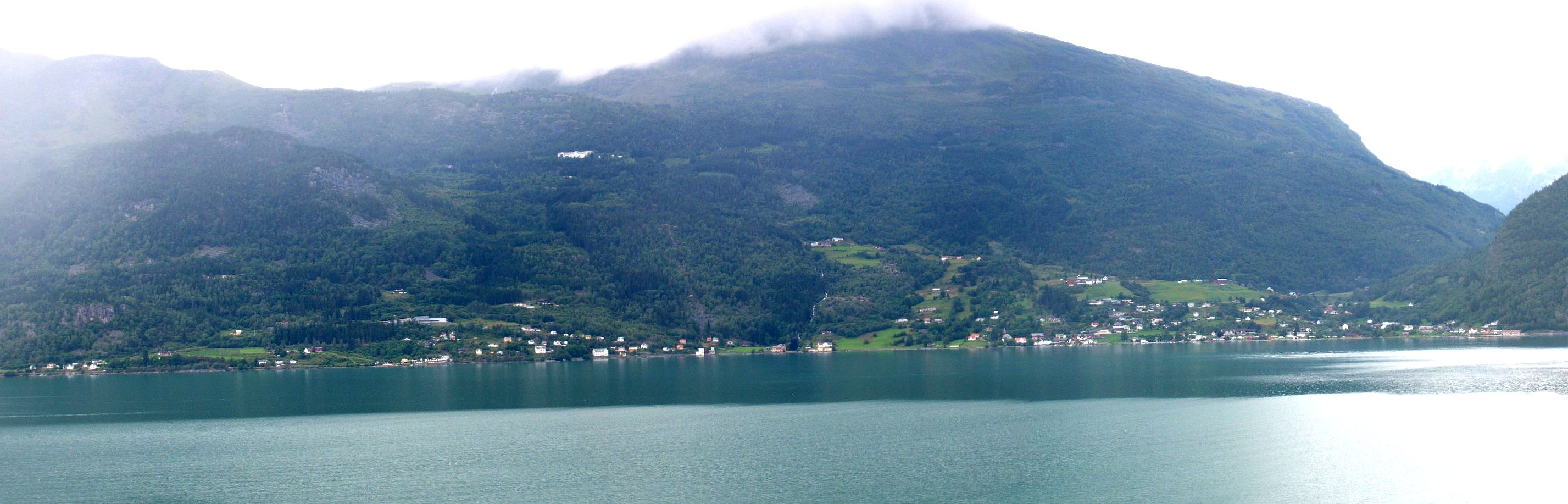 Luster in Luster township in the Sognefjord Luster er ei bygd som ligg ved Lustrafjorden på rv55, ca midt mellom Gaupne og Skjolden inst i fjorden.